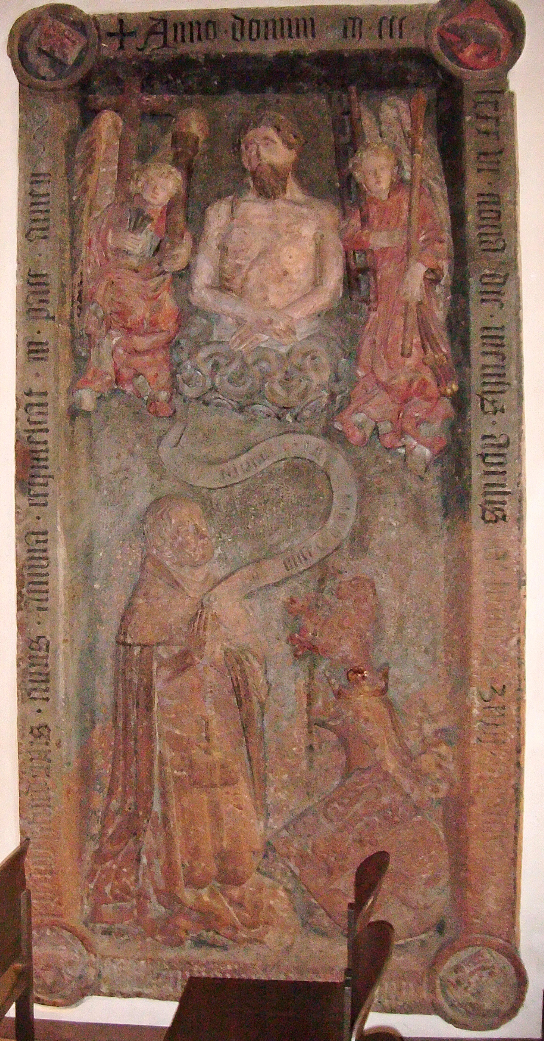 Frankfurt, Alte St. Nikolaikirche, Epitaph für Siegfried zum Paradies (+ 1386), Bürgermeister von Frankfurt